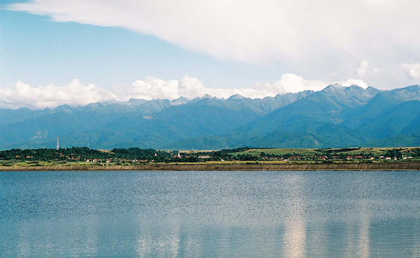 Alt bei Porumbacu de Jos (nahe Freck).